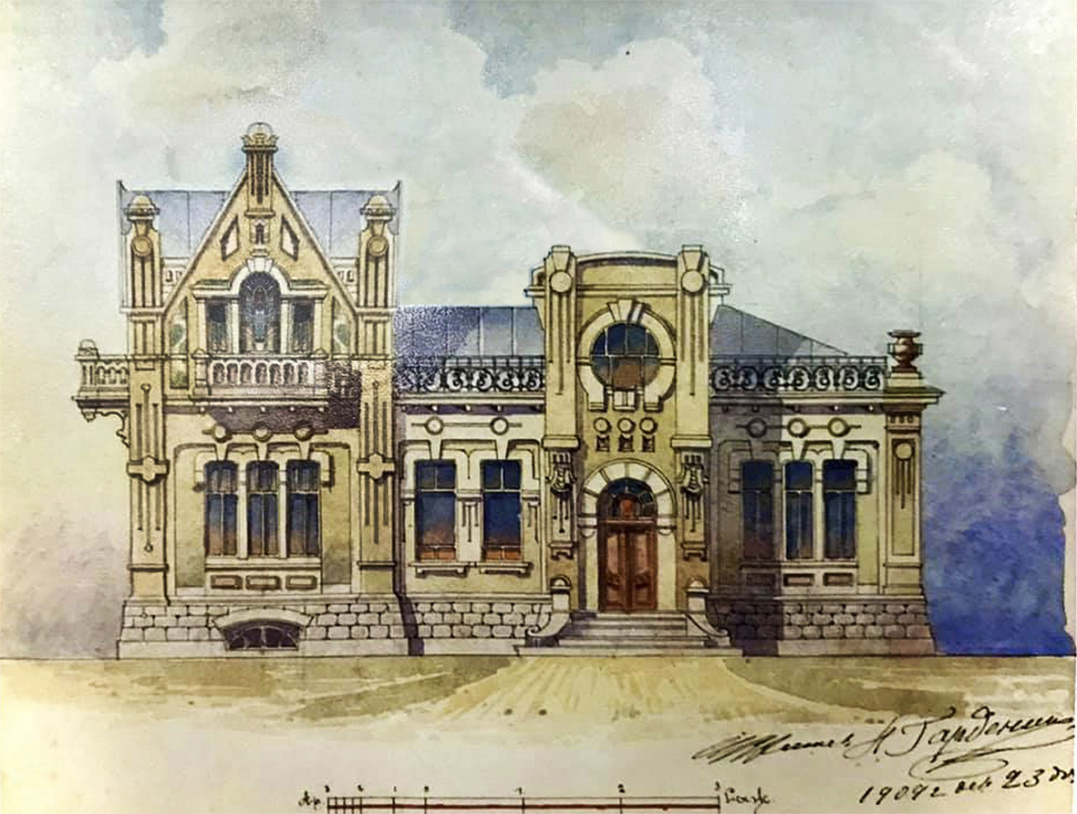 Кам'яниця на Нагірній вулиці, 14, Київ